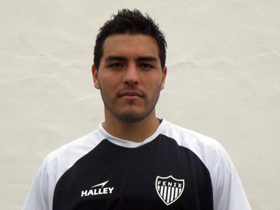 Alan Gabriel Rodríguez